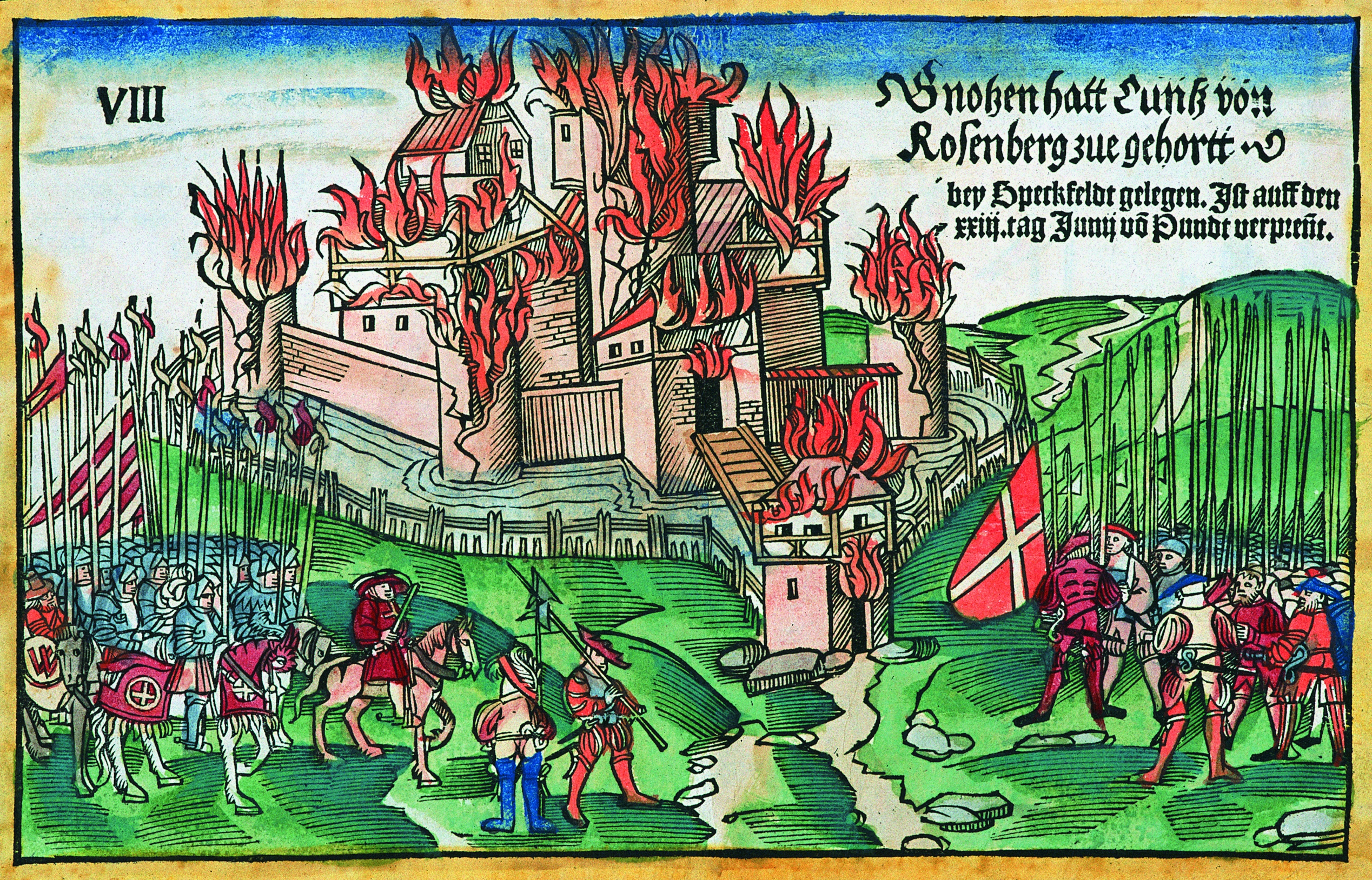 Bild aus dem Burgenbuch der Staatsbibliothek Bamberg, Staatsbibliothek Bamberg, RB.H.bell.f.1